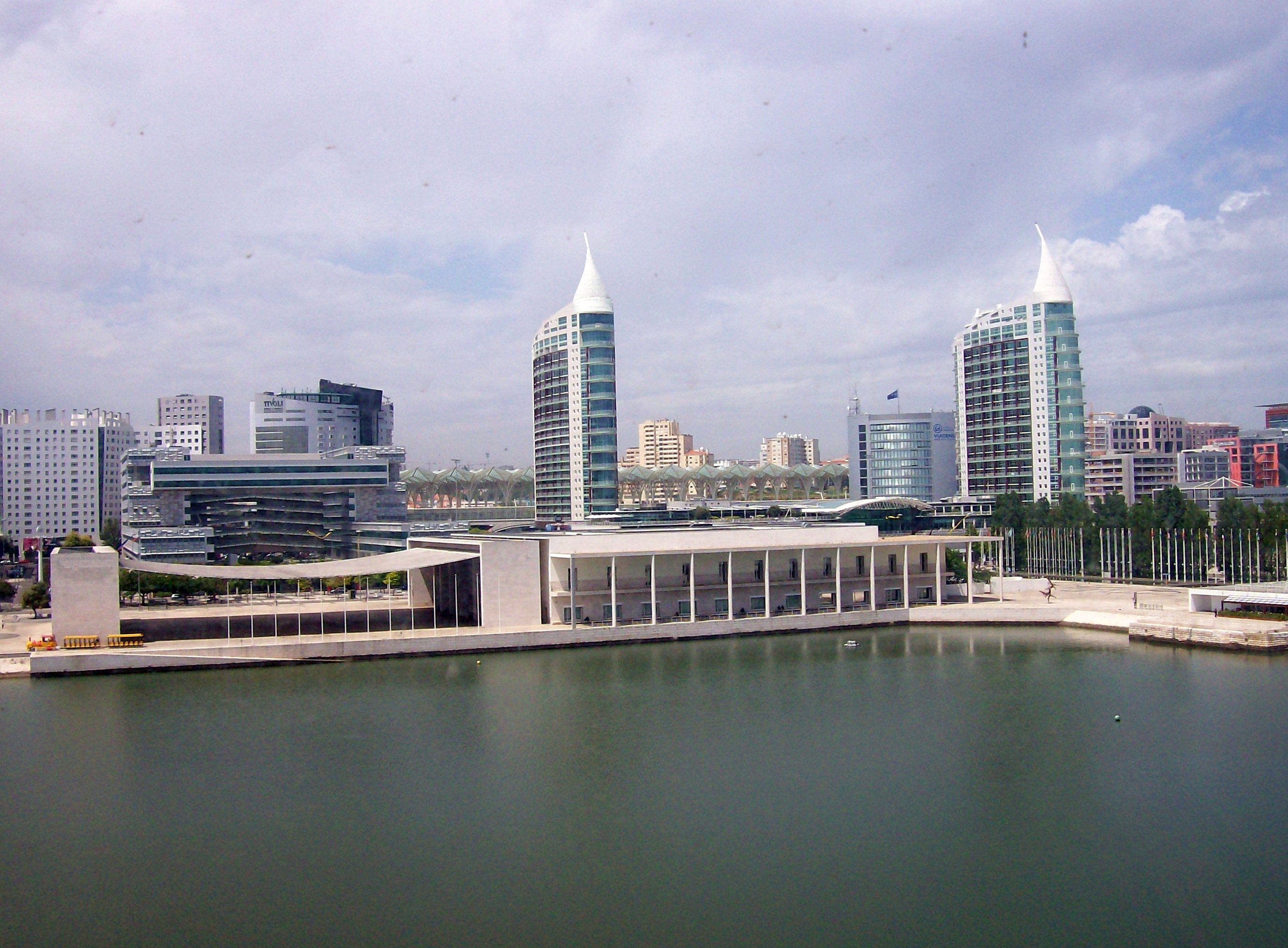 Parque_das_Nações, Lissabon (Portugal)